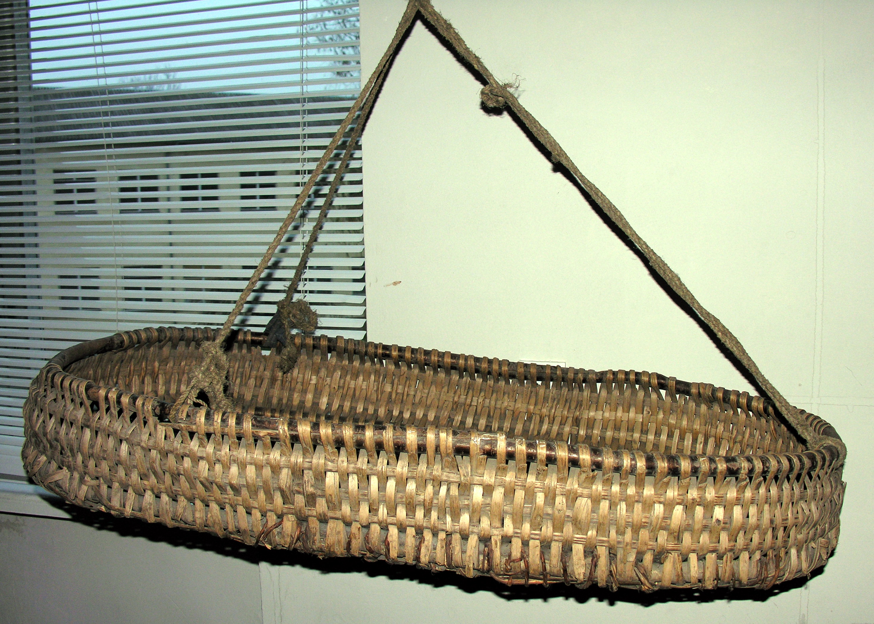 Lopšys 2006-11-22, Lietuva